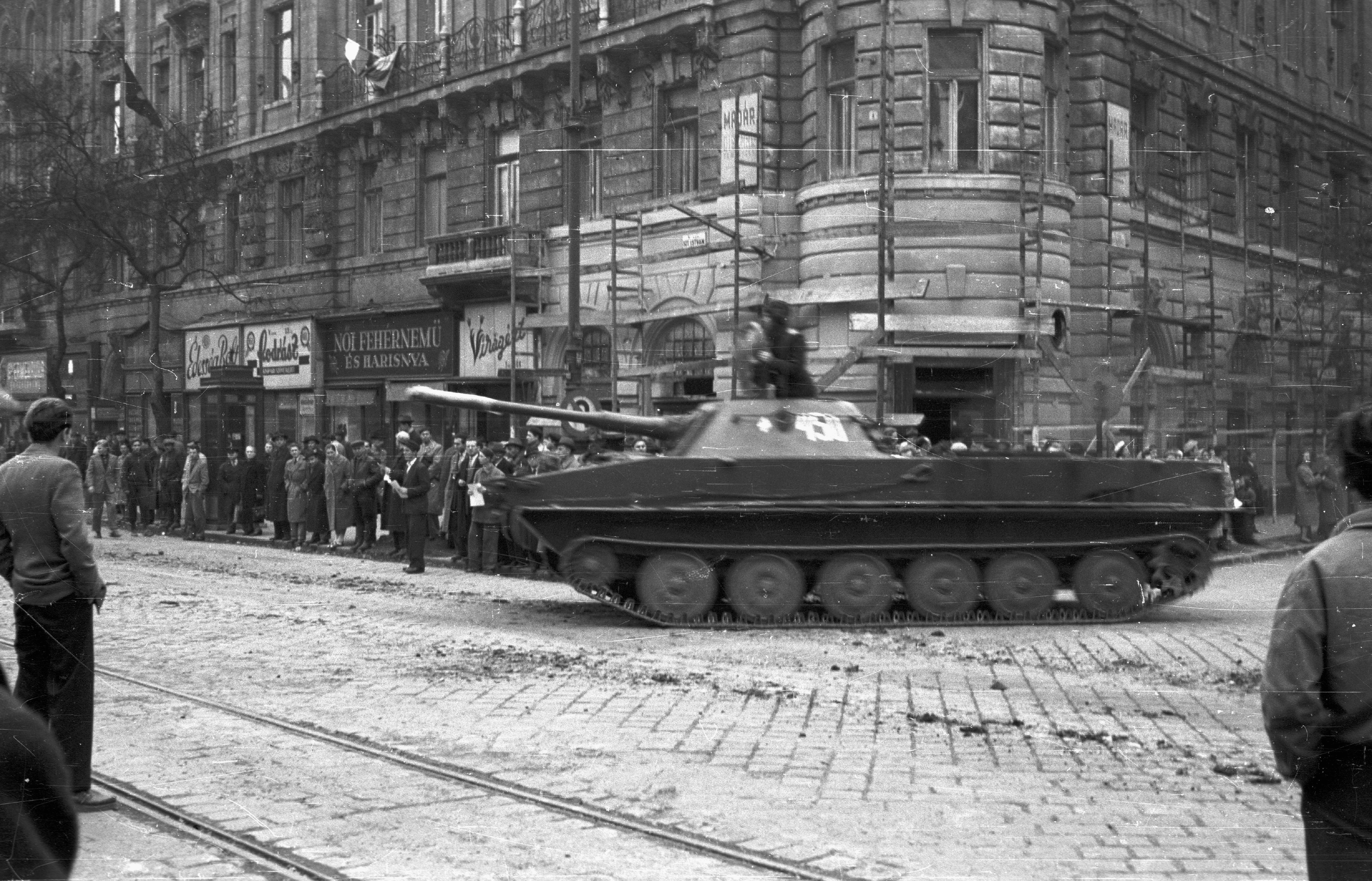 Budapest V. Szent István körút - Falk Miksa (Néphadsereg) utca sarok. PT-76-os úszó harckocsi. A szovjet csapatok ideiglenes kivonulása 1956. október 31-én.